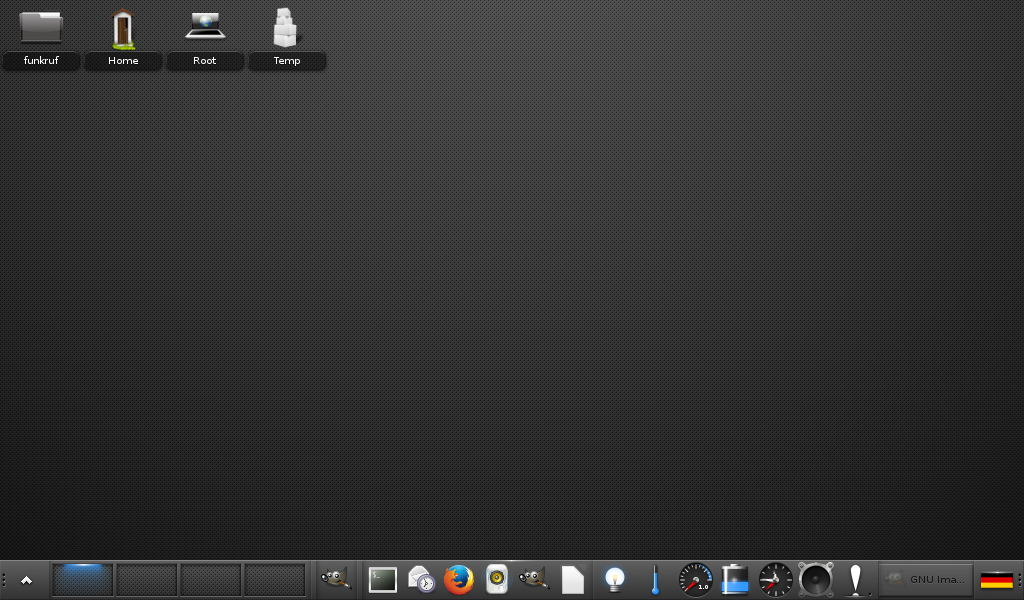 Fedora 20 mit Enlightenment, welches neu in dieser Version ist.